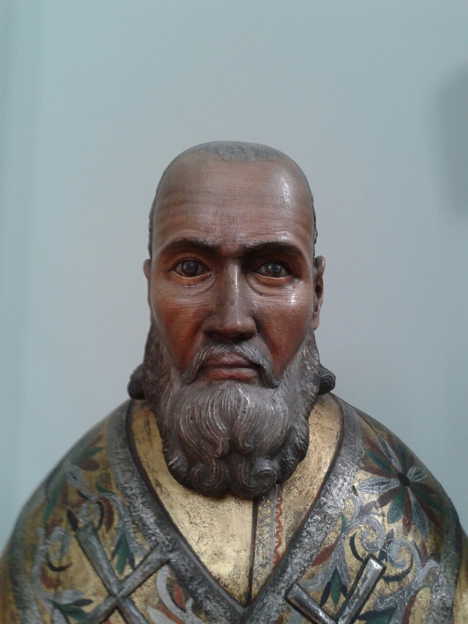 Св.Николай Можайский из д.Зеленята. Кон. XVIII - нач. XIX вв.